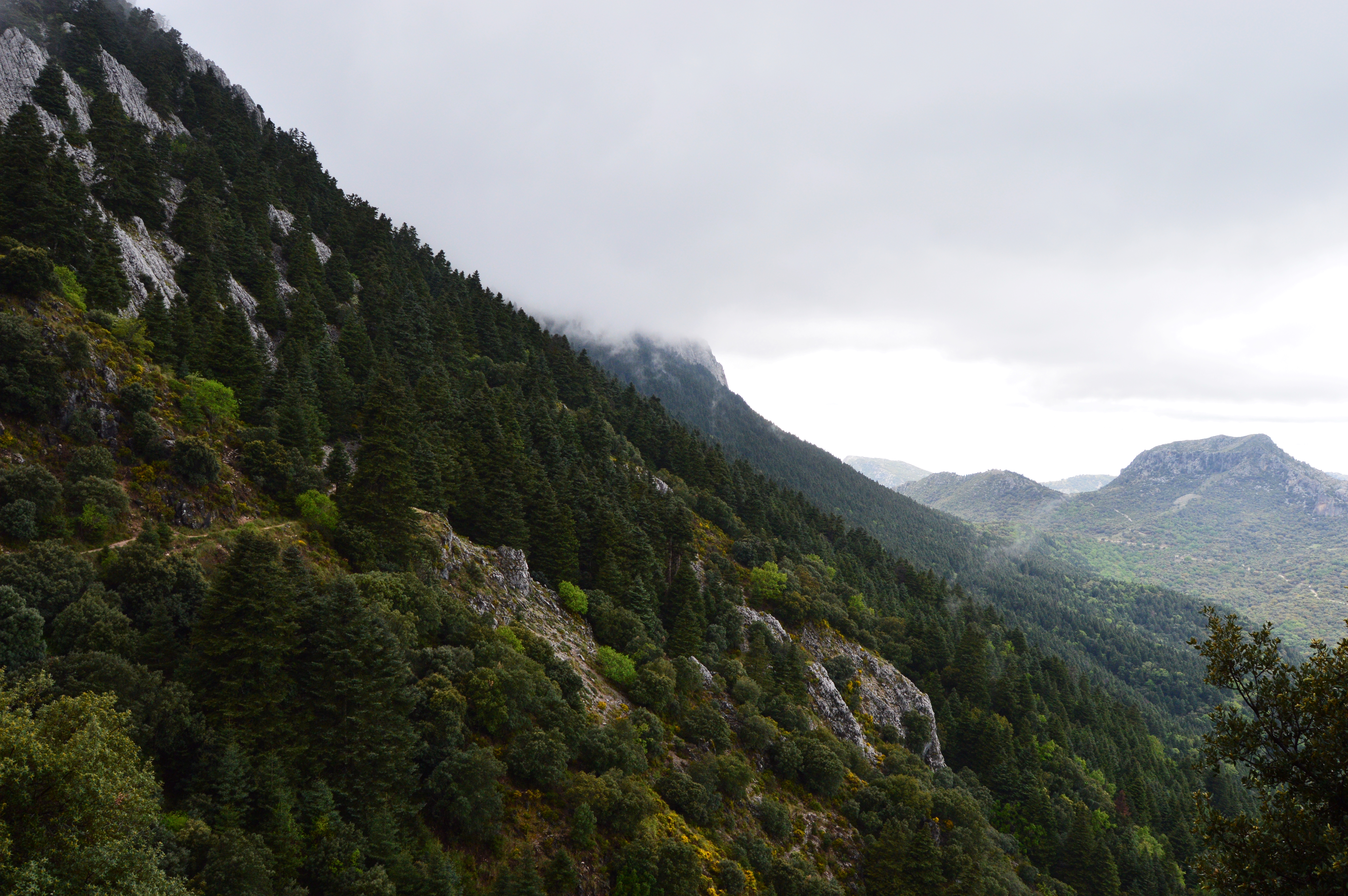 Sierra de Grazalema This is a photography of a Special Area of Conservation in Spain with the ID: ES0000031. Natura2000 entry, EEA entry